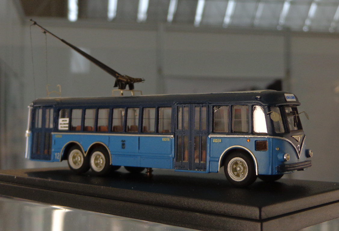 Modello in scala H0 di un filobus della linea Ancona-Falconara (tipo Alfa Romeo 140AF), realizzato dalla N3C ed esposto alla fiera di modellismo "Hobby Model Expo" del 2013.